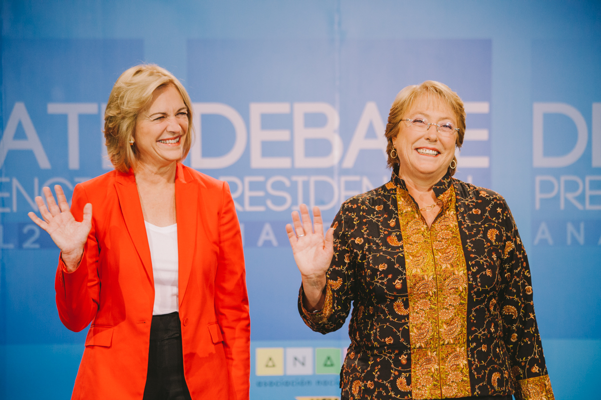 Debate ANATEL 10/12/2013